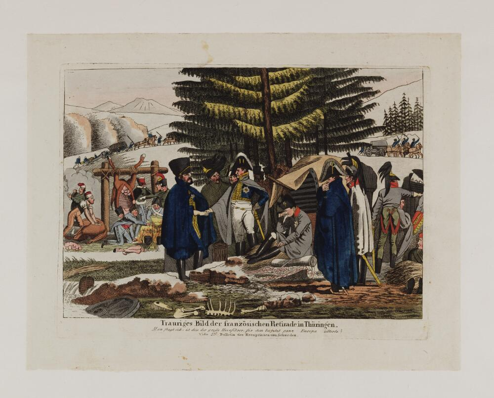 German political cartoon